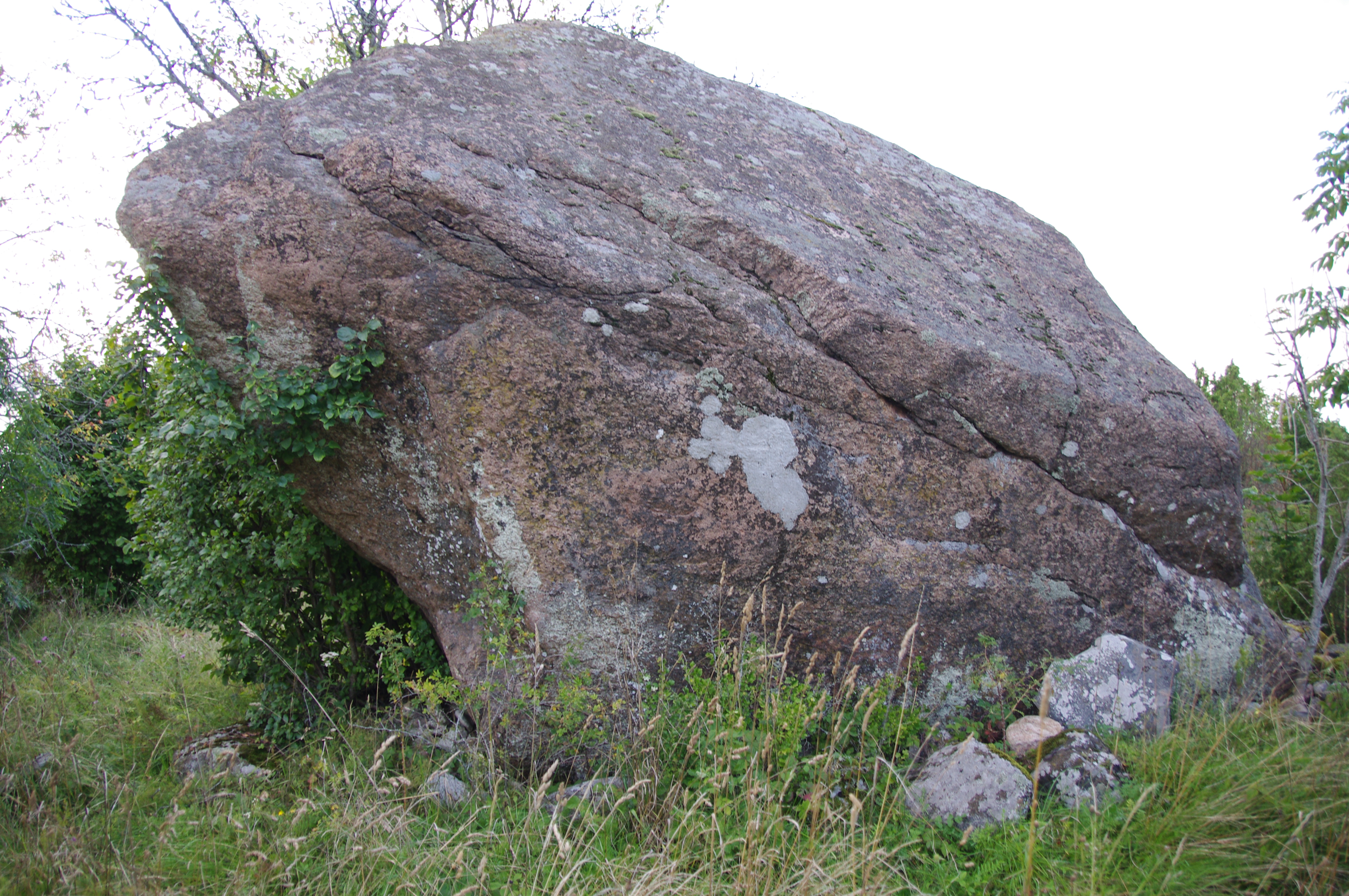 Ohvrikivi "Hiiekivi"